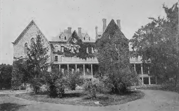 Kansas, USA